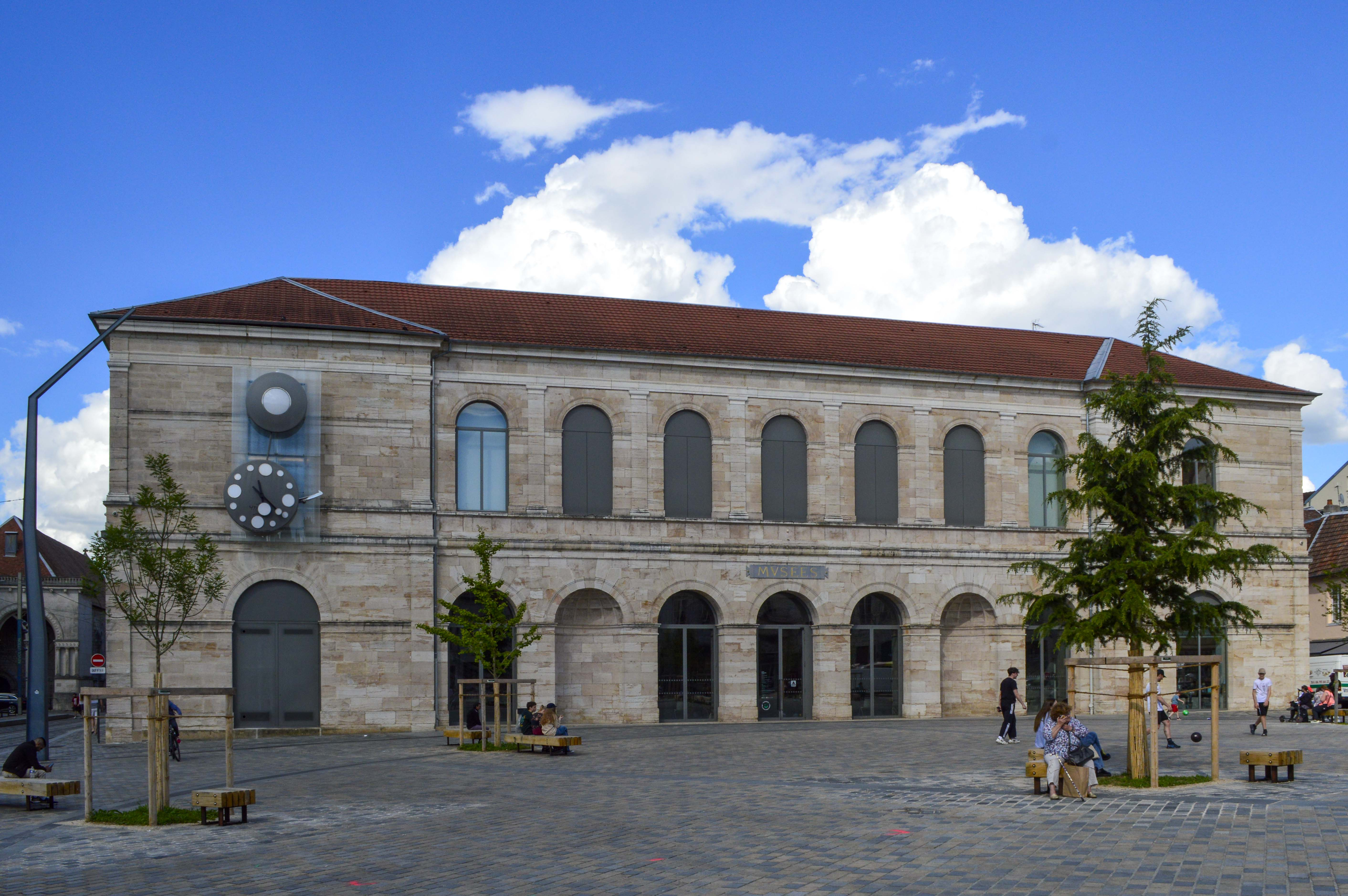 Façade principale du Musée des Beaux-Arts et d'Archéologie de Besançon.